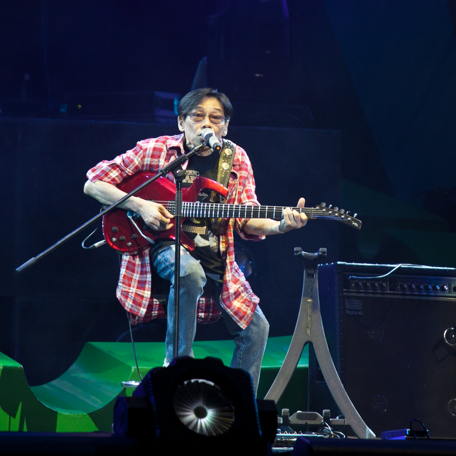 Teddy Robin